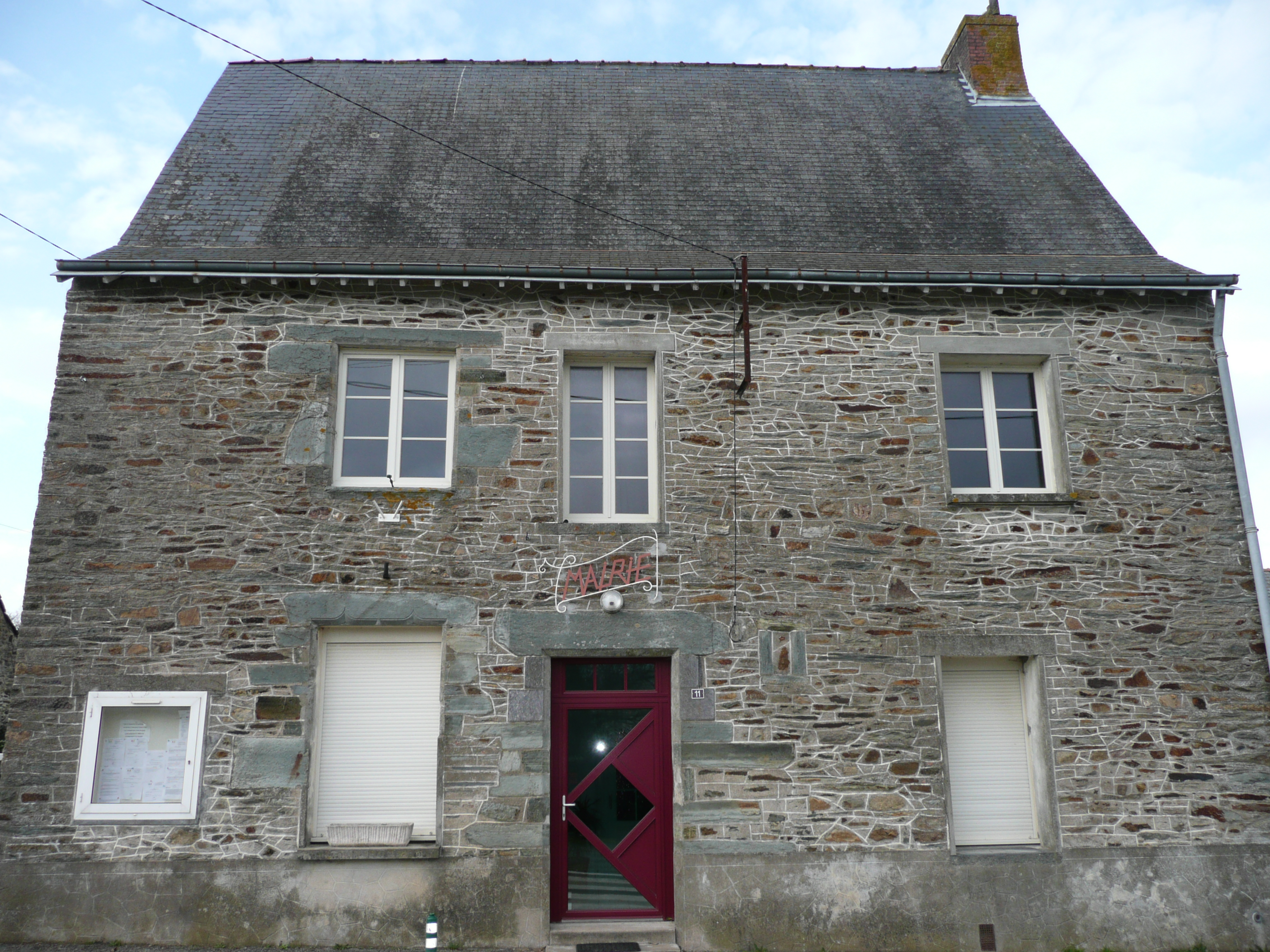 Mairie de Carbay